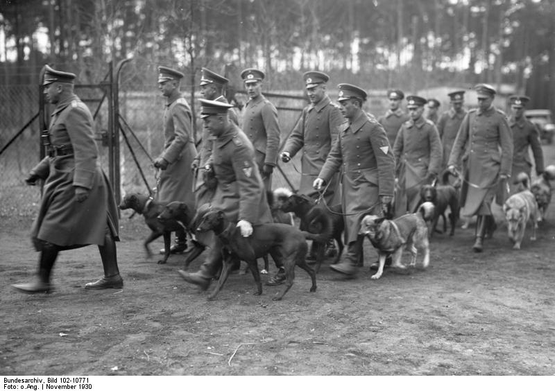 Einen Tag bei den Heereshunden der Reichswehr in Kummersdorf b/Berlin! Reichswehrangehörige begeben sich mit ihren Meldehunden zur Uebung in Kummersdorf.